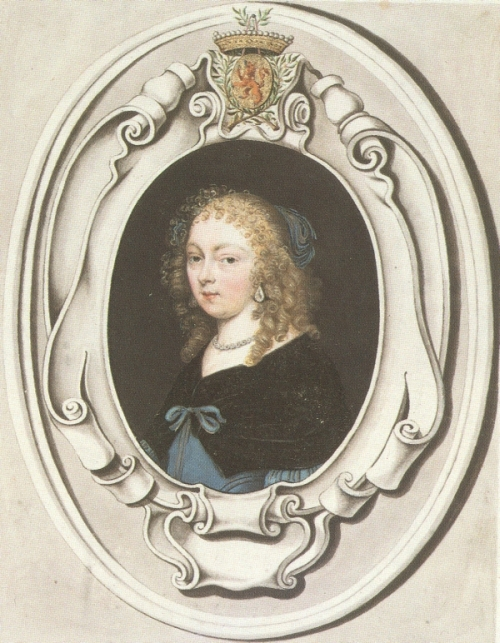 Selbstbildnis der niederländischen Malerin Gesina ter Borch (1633-1690) mit dem Familienwappen der ter Borchs